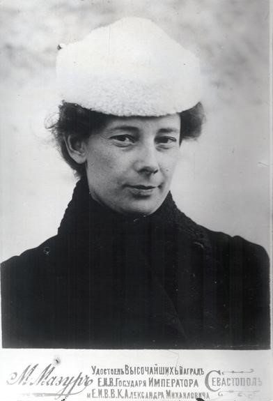 Екатерина Александровна Бибергаль - российская революционерка, член партия социалистов-революционеров. Ателье М. Мазура, Севастополь, 1903